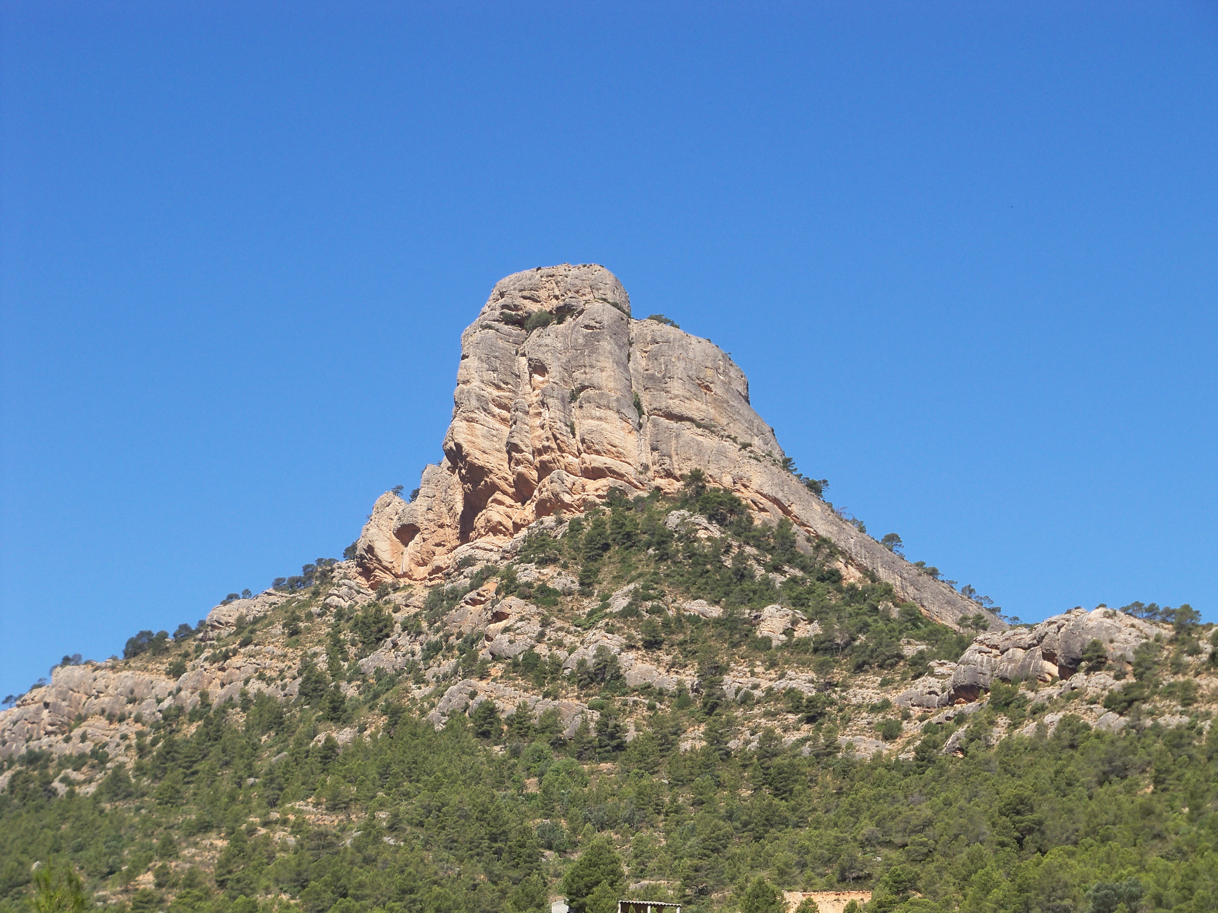 L´agulla de Bot des de l´estació de Prat.